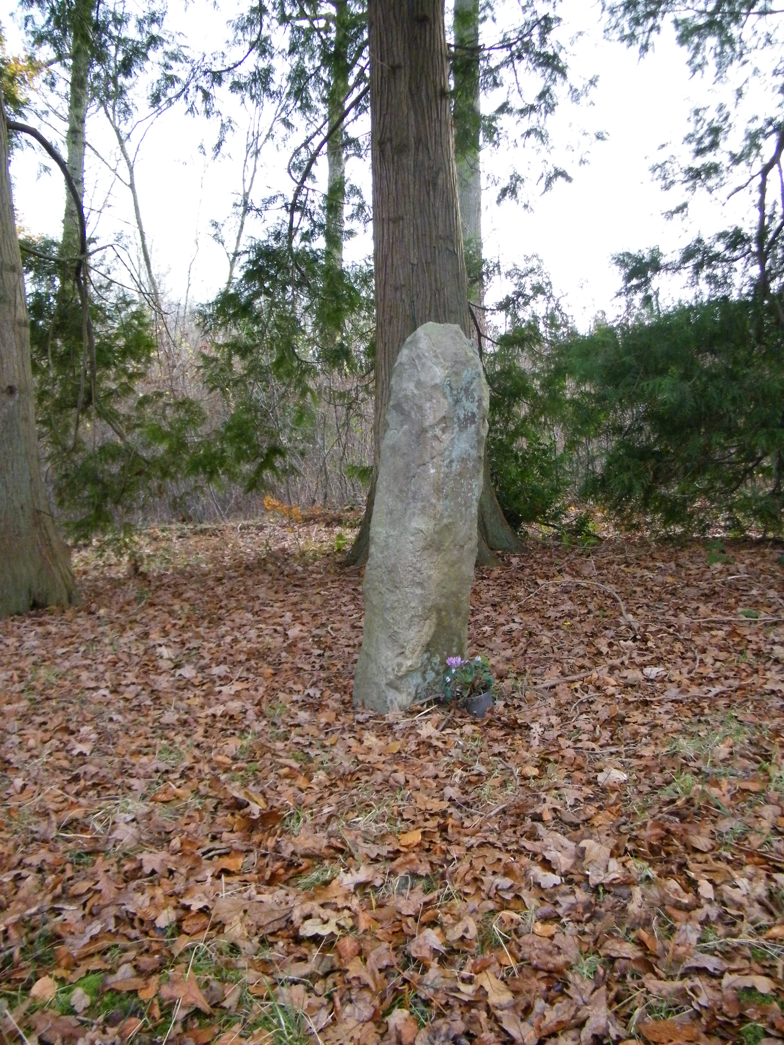 La longue borne, ancien repère de limite des bois ecclésiastiques.